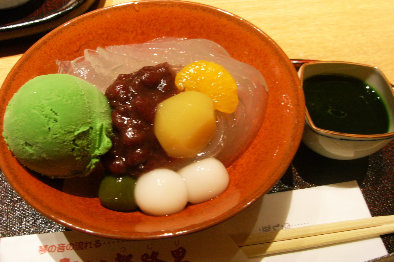 汐留で食べた抹茶みつのところてん。